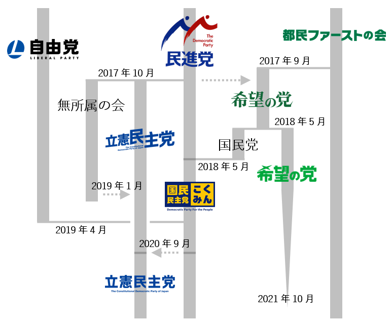 民進党と希望の党の系譜